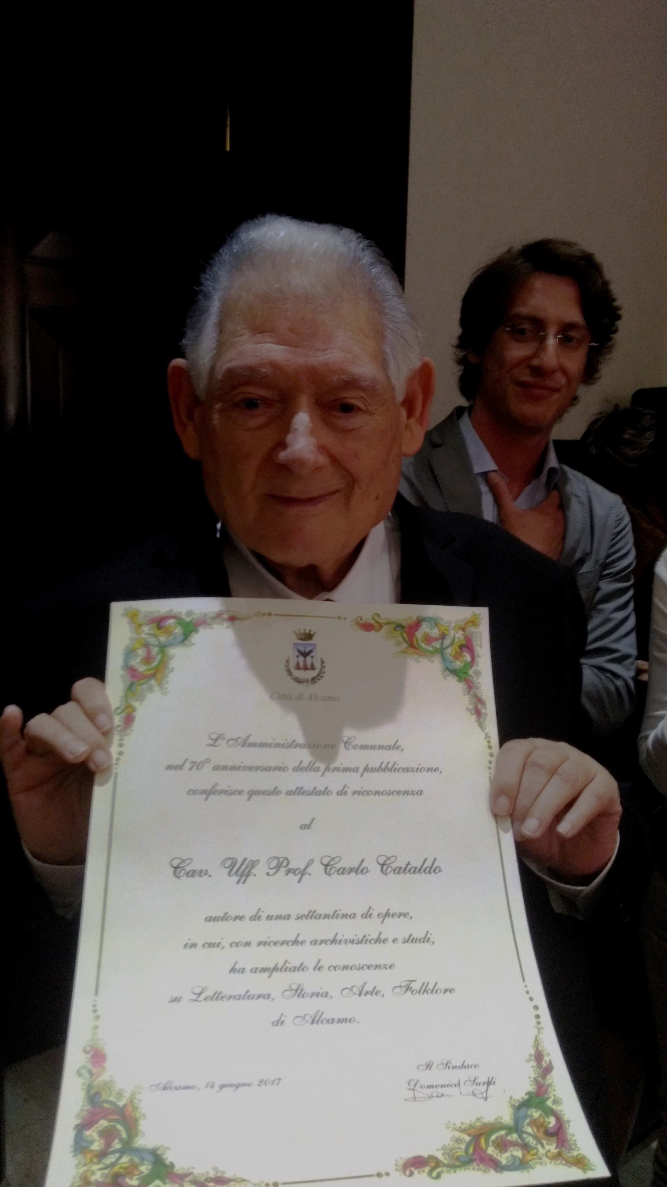 Cataldo e l'attestato ricevuto dal Sindaco di Alcamo il 14 giugno 2017